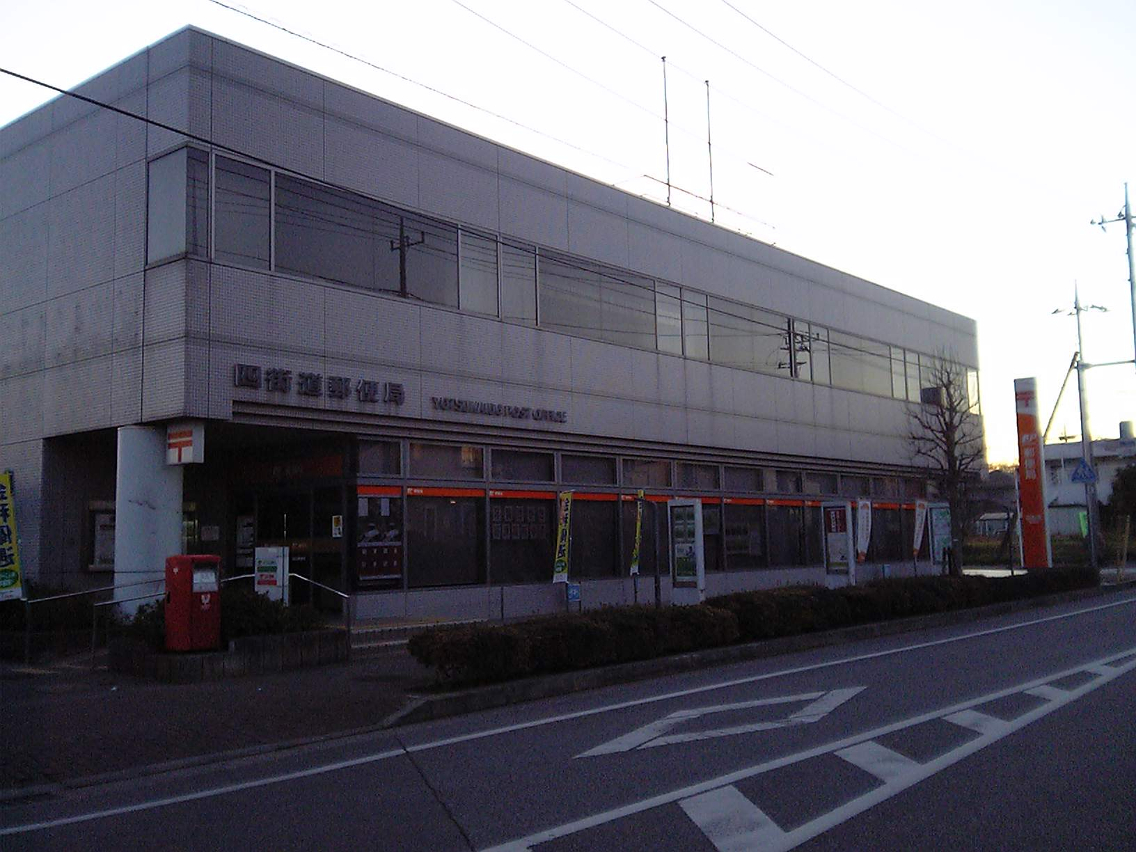 四街道郵便局